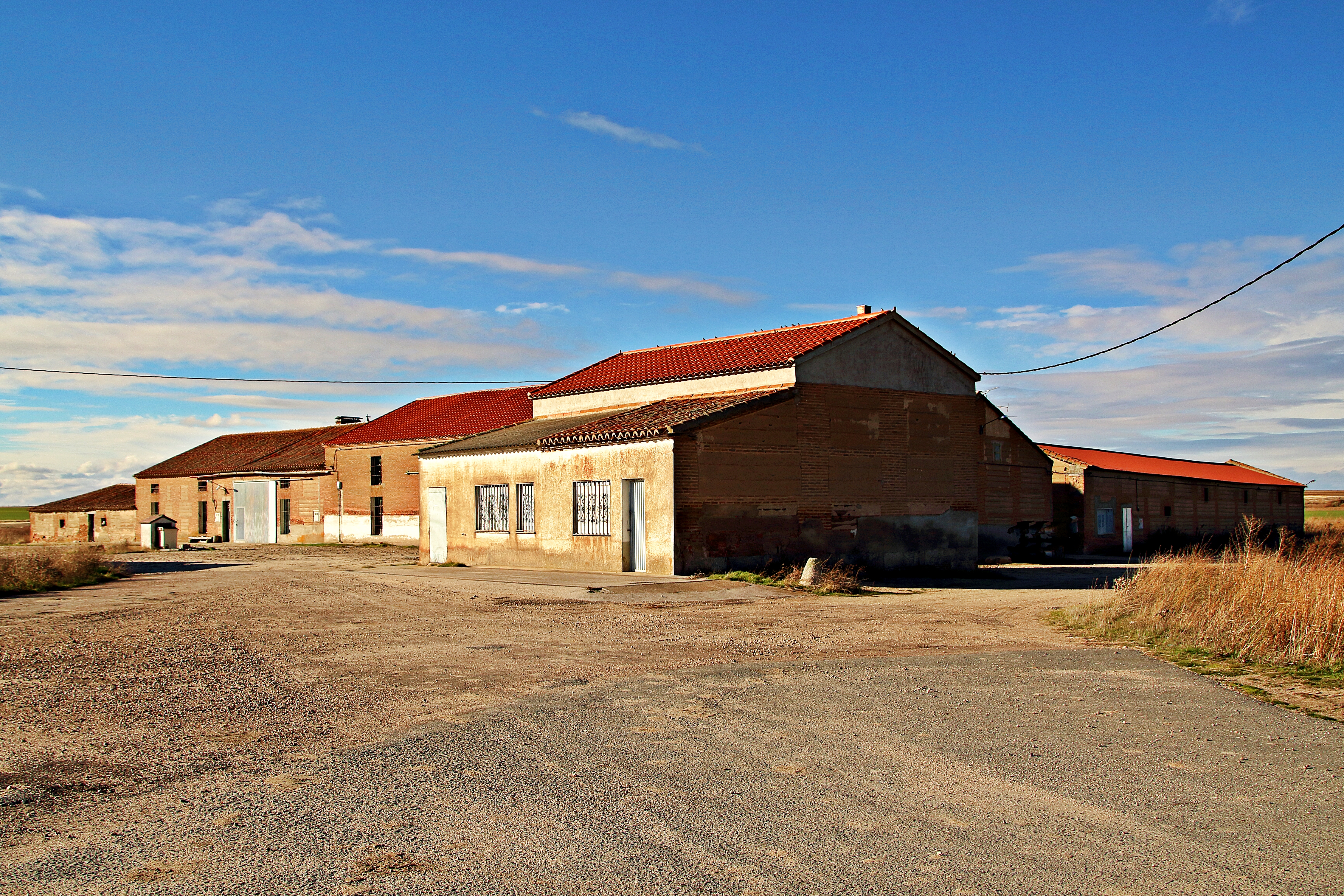 Pedrezuela de San Bricio es una localidad del municipio de Villar de Gallimazo, perteneciente a la comarca de Tierra de Peñaranda, provincia de Salamanca.